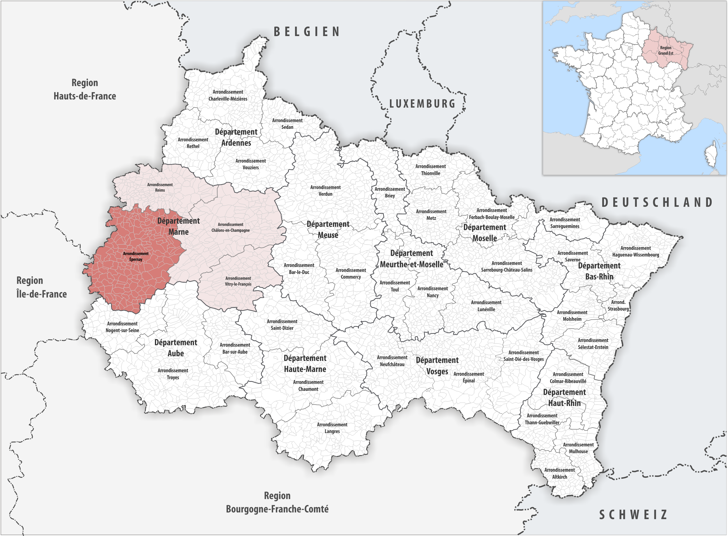 Lage des Arrondissements Épernay